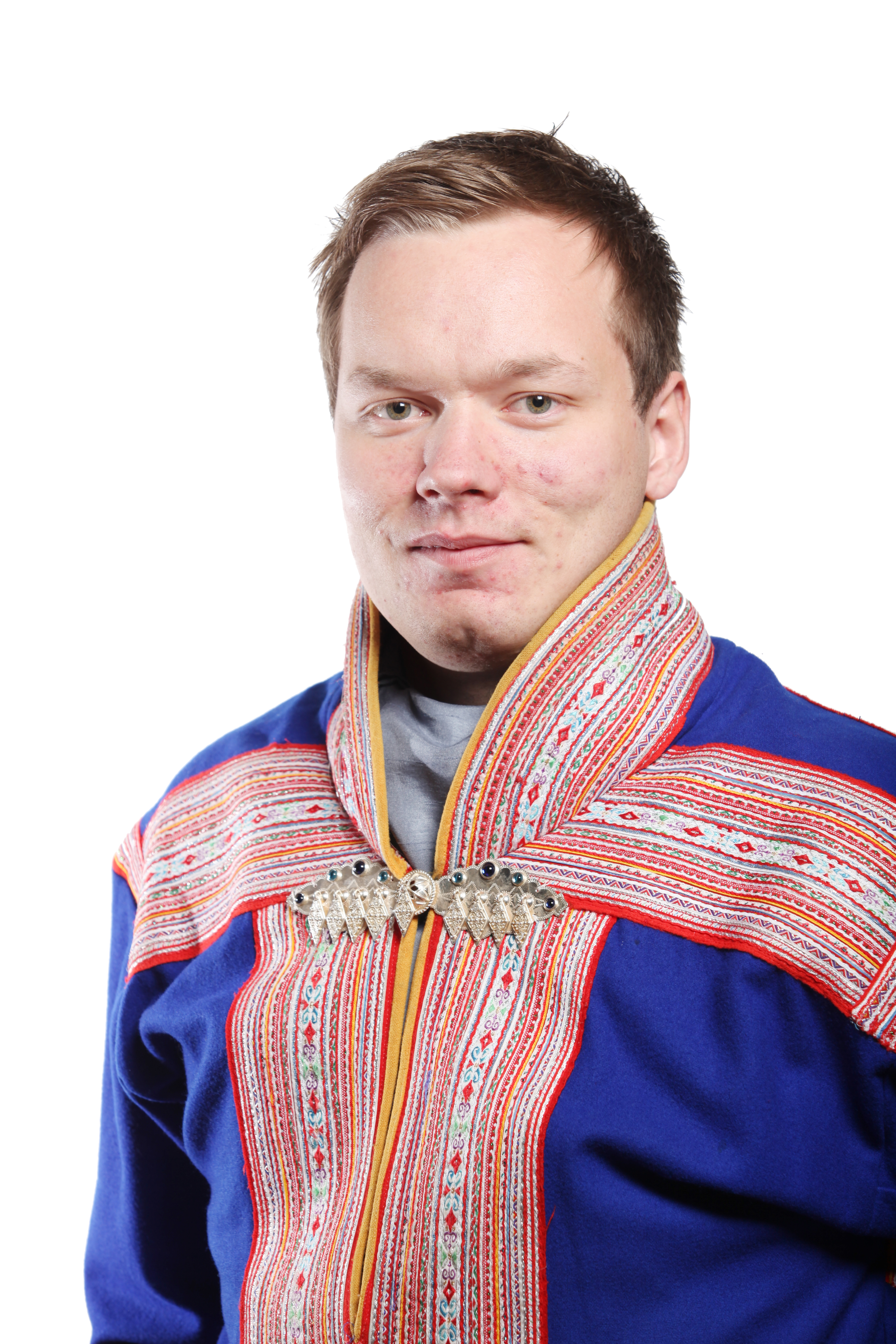 Medlem av oppvekst-, omsorg- og utdanningskomitéen. Foto: Kenneth Hætta / Sametinget.